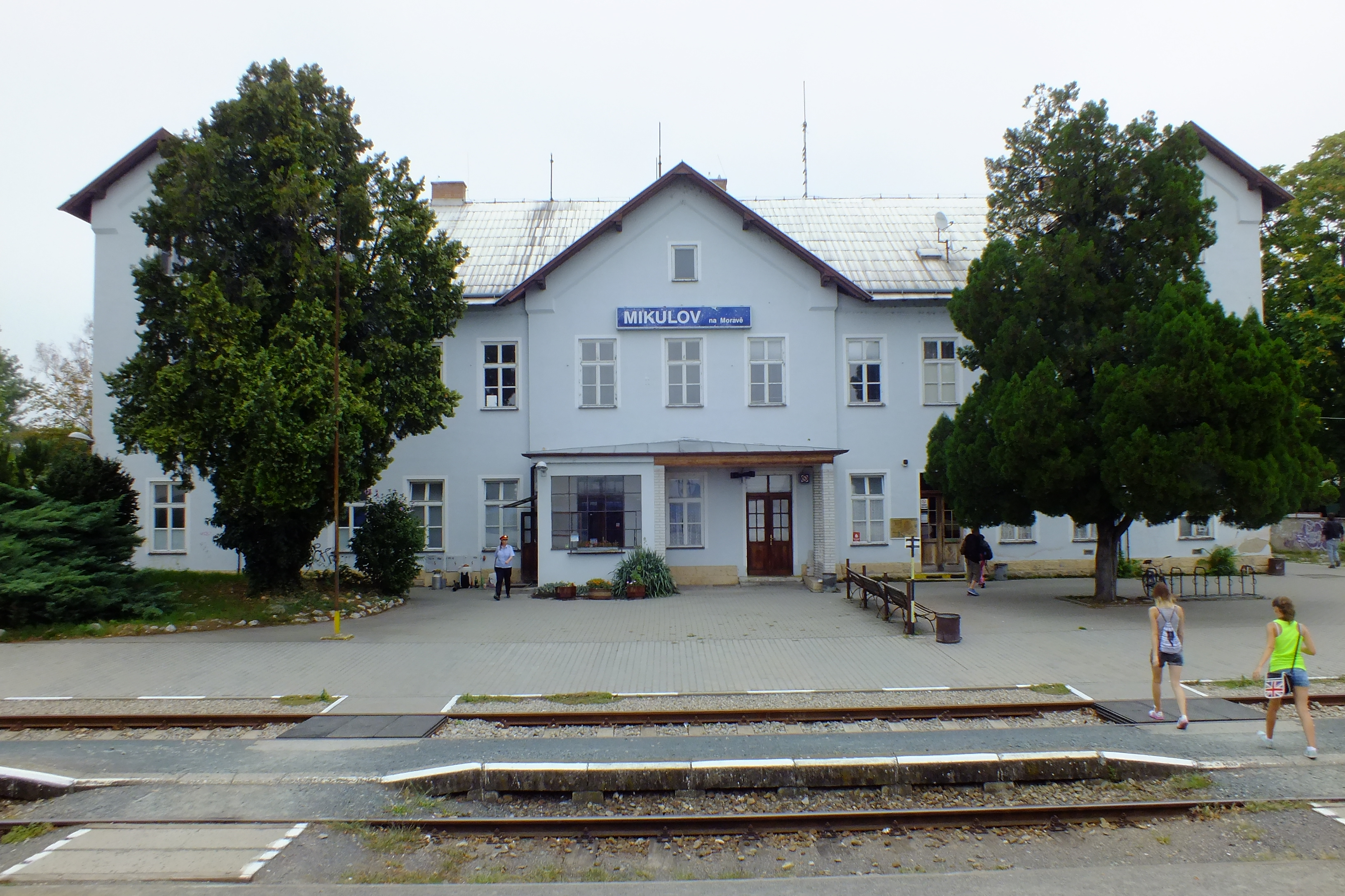 Staniční budova